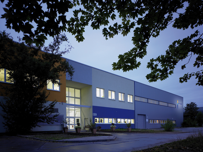 ersol Konzernzentrale in Erfurt